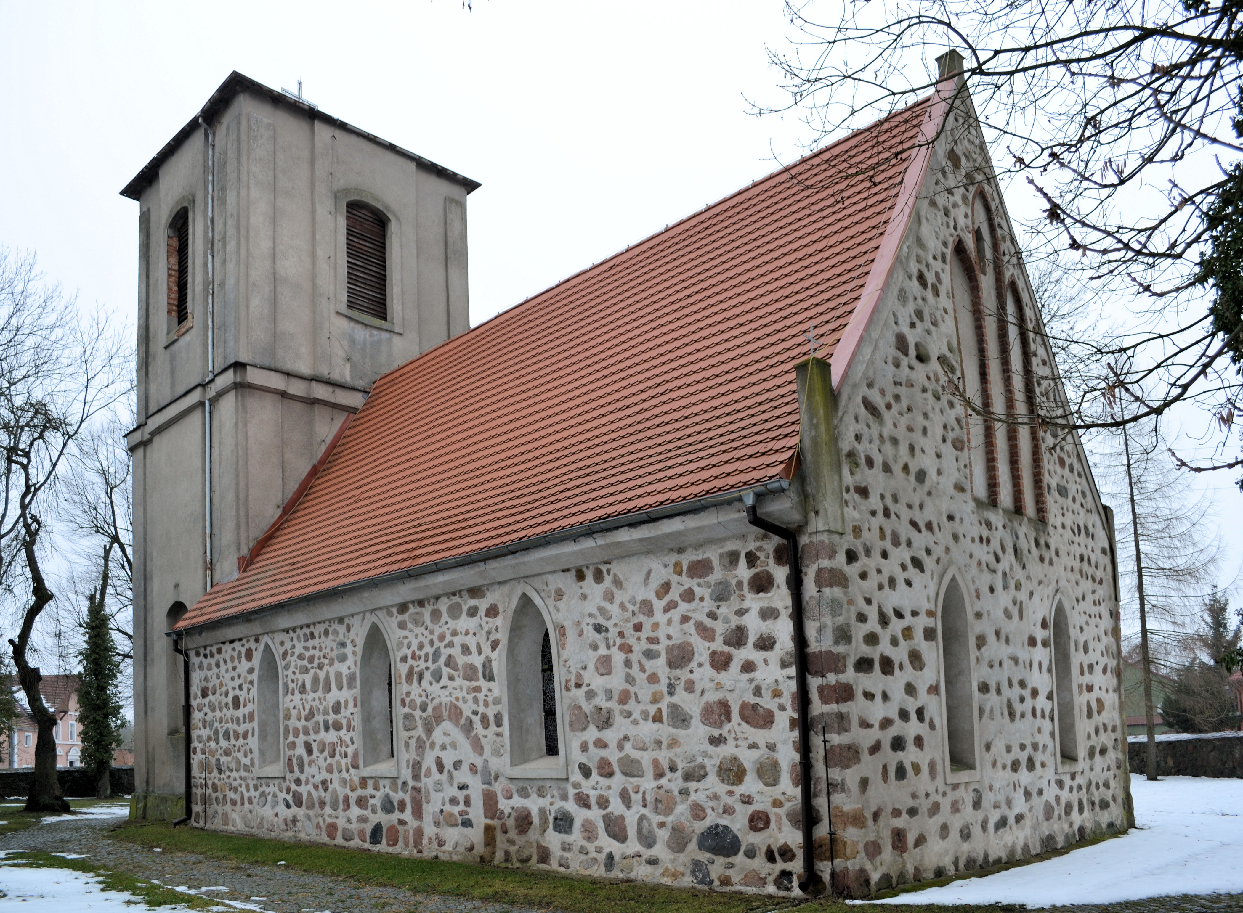 Kościół w Kołbaskowie